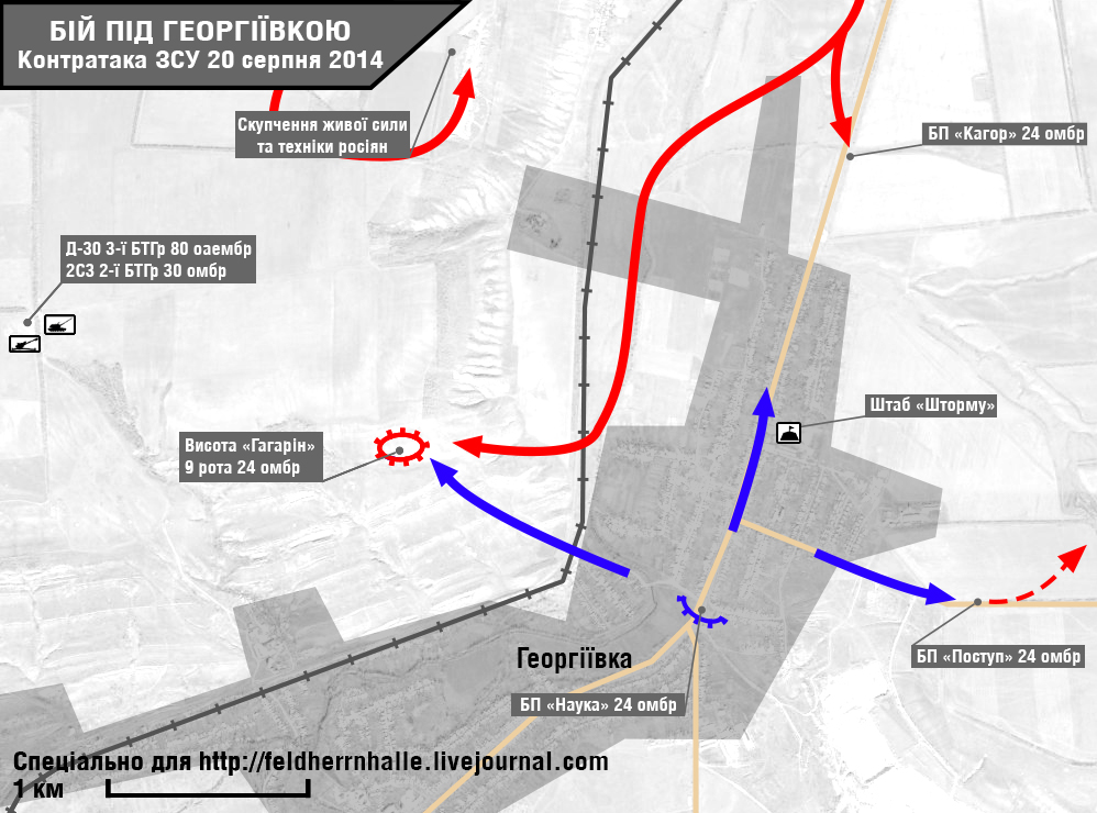 Бій 19-20 серпня 2014 під Георгіївкою. 2-а фаза бою, контратака підрозділів ЗСУ 20 серпня 2014 та повернення втрачених позицій.